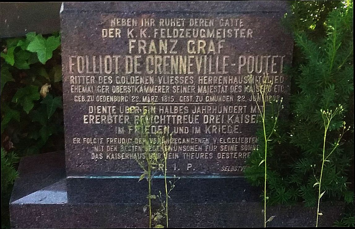 Friedhof Altmünster - Grab der gräflichen Familie "Folliot de Crenneville-Poutet"